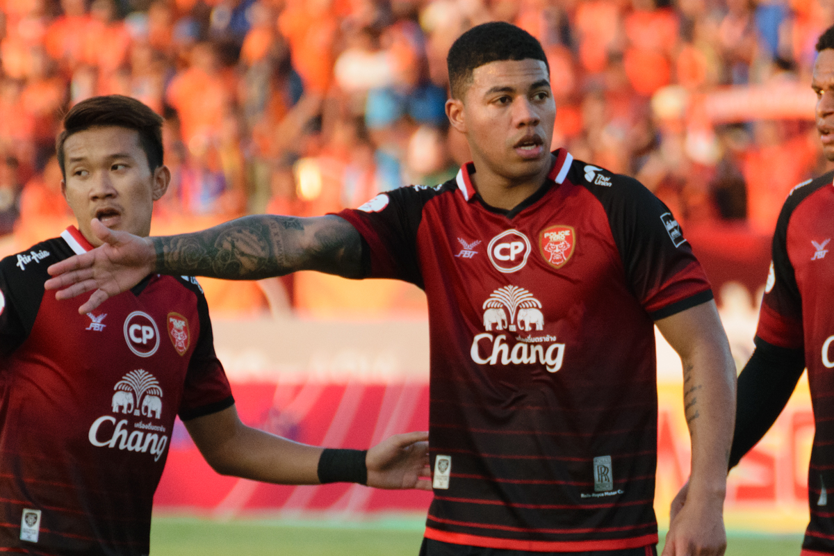 Douglas Tanque